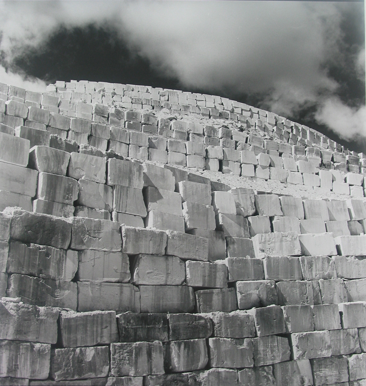 Kuben im Kalksteinbruch